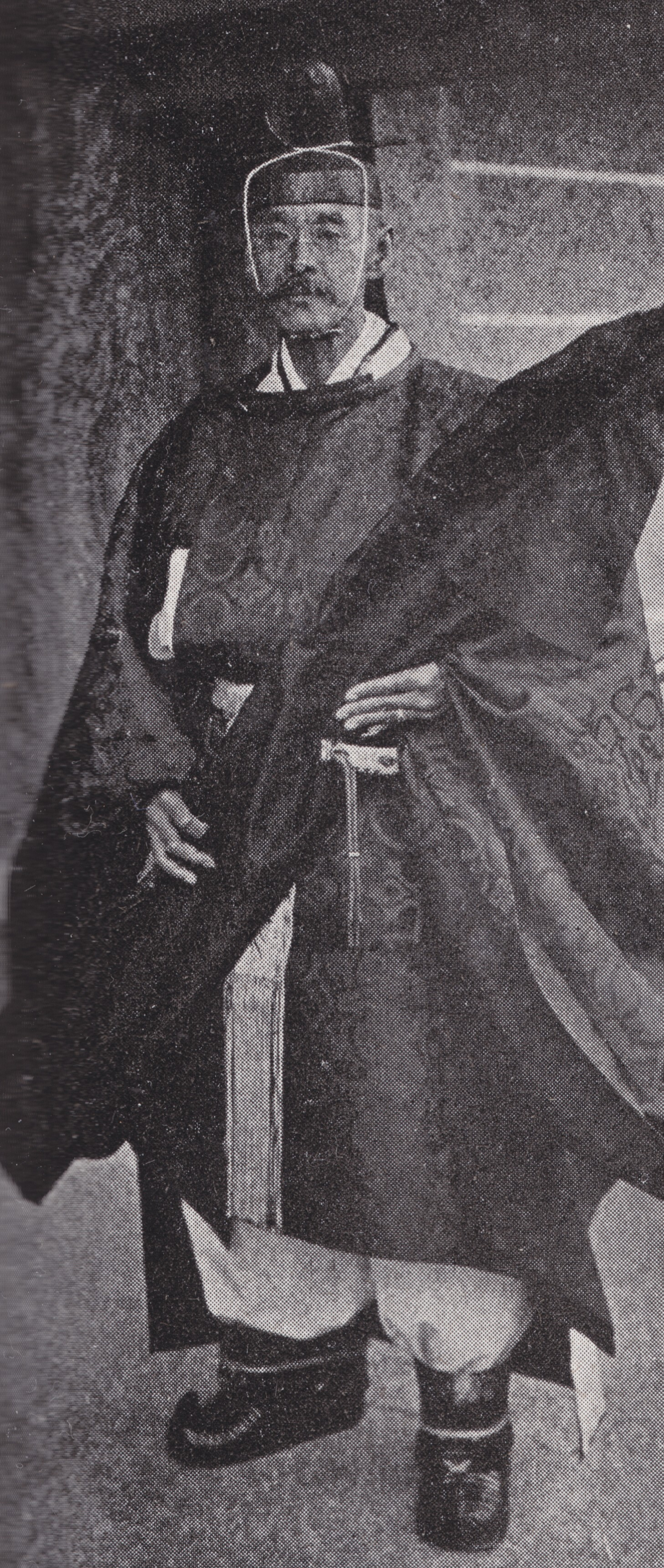 大礼使典儀官大炊御門師前